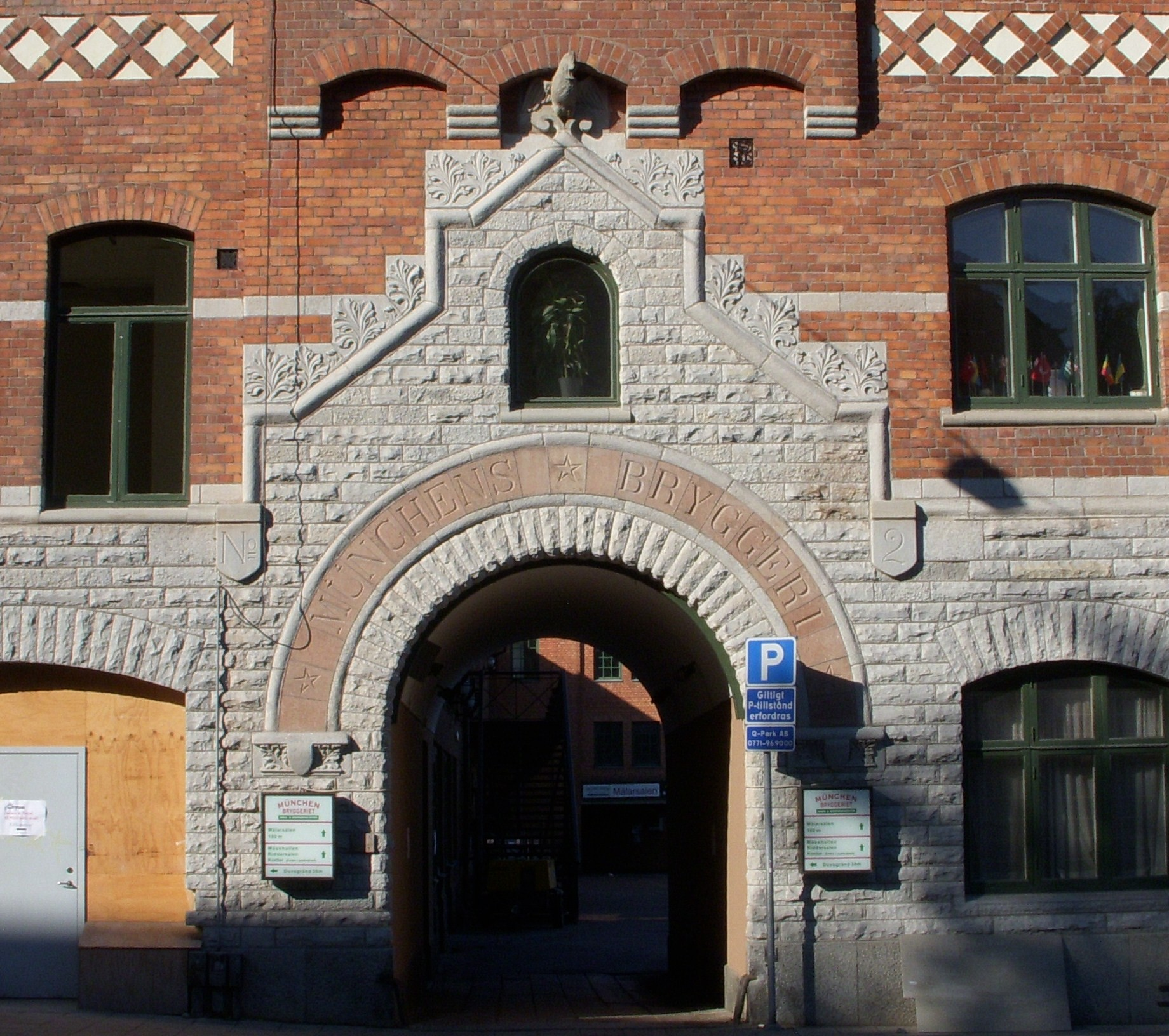 Münchenbryggeriet i Stockholm